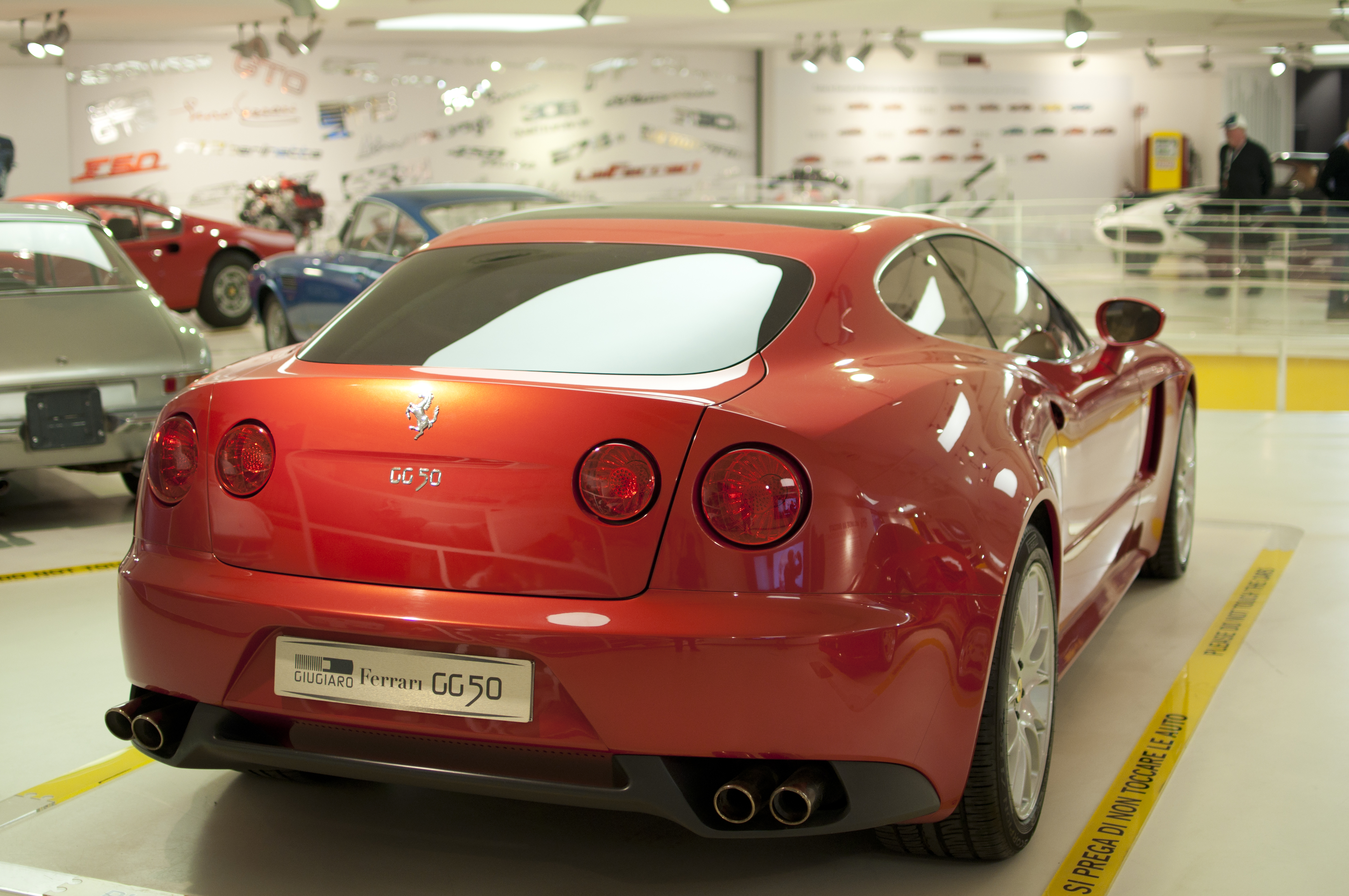 Automotive Design Legends Giorgetto Giugiaro personal car.